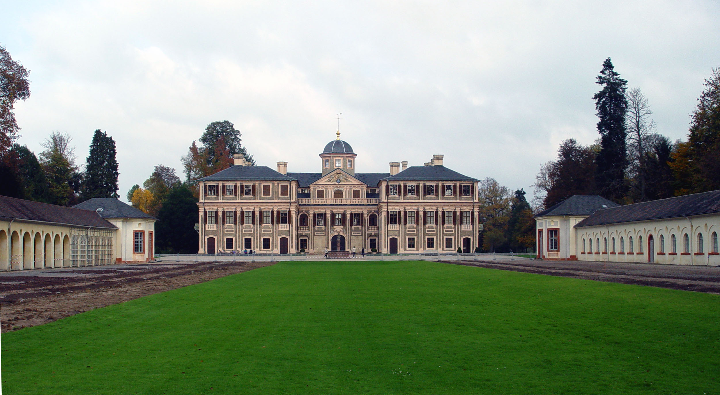 Fotografiert von Martin Dürrschnabel. Schloss Favorite in Rastatt.